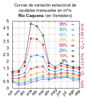 Curvas de variación estacional del río Caquena en Vertedero. # Dirección General de Aguas # PLAN DIRECTOR PARA LA GESTION DE LOS RECURSOS HIDRICOS EN LA CUENCA DEL RIO SAN JOSE VOLUMEN N° II INFORME FINAL ANEXOS # Santiago de Chile # Ministerio de Obras Públicas (Chile) # 1998 # url: # TABLA 3.22 CURVAS DE VARIACION ESTACIONAL. RIO CAQUENA EN VERTEDERO pág. A3-13 mes 95% 90% 85% 70% 50% 25% 10% 5% oct 0.465 0.519 0.559 0.655 0.765 0.939 1.128 1.259 nov 0.222 0.343 0.424 0.594 0.768 0.993 1.194 1.315 dic 0.271 0.381 0.461 0.651 0.880 1.146 1.664 1.963 ene 0.441 0.574 0.686 0.995 1.458 2.380 3.701 4.820 feb 0.549 0.695 0.815 1.135 1.594 2.468 3.658 4.629 mar 0.687 0.832 0.948 1.244 1.643 2.349 3.242 3.941 abr 0.619 0.700 0.761 0.904 1.079 1.356 1.664 1.882 may 0.768 0.821 0.861 0.953 1.065 1.245 1.447 1.593 jun 0.760 0.832 0.884 1.009 1.160 1.400 1.674 1.871 jul 0.822 0.880 0.923 1.023 1.145 1.339 1.560 1.719 ago 0.592 0.704 0.779 0.936 1.097 1.304 1.490 1.601 sep 0.631 0.692 0.736 0.840 0.966 1.166 1.395 1.560